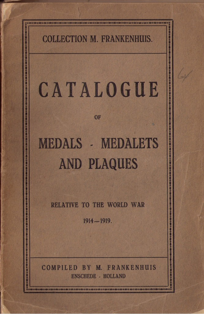 שער קטלוג המדליות (המהדורה האנגלית) של מוריס פרנקנהויס